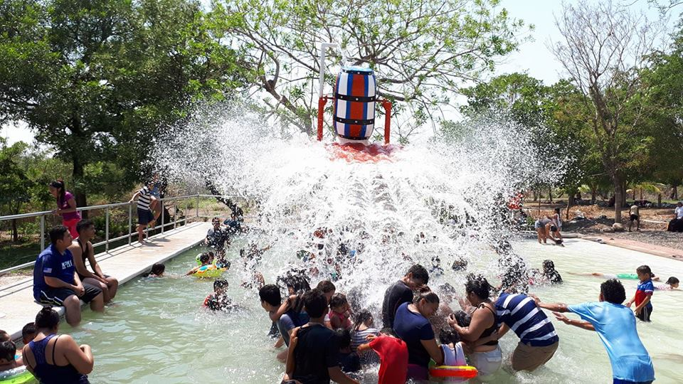 Excelente diversión